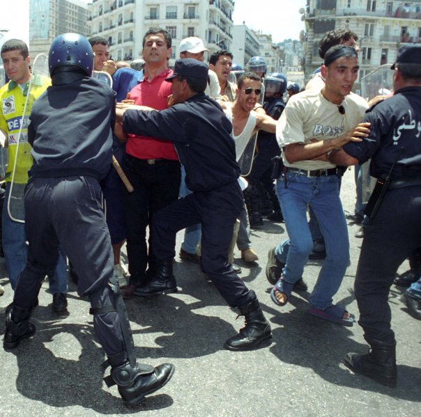 Marche événements 2001